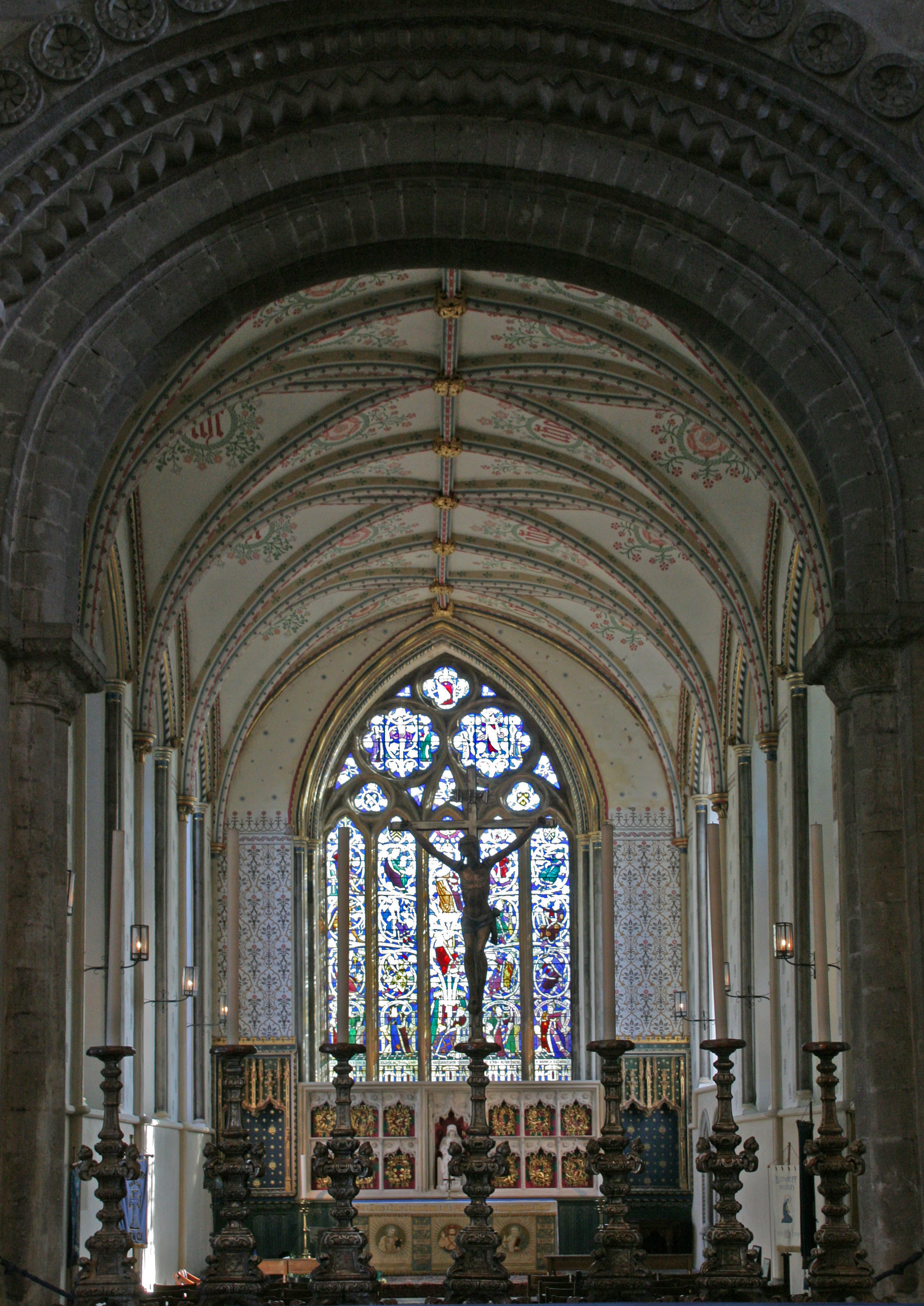 Llandaff Cathedral